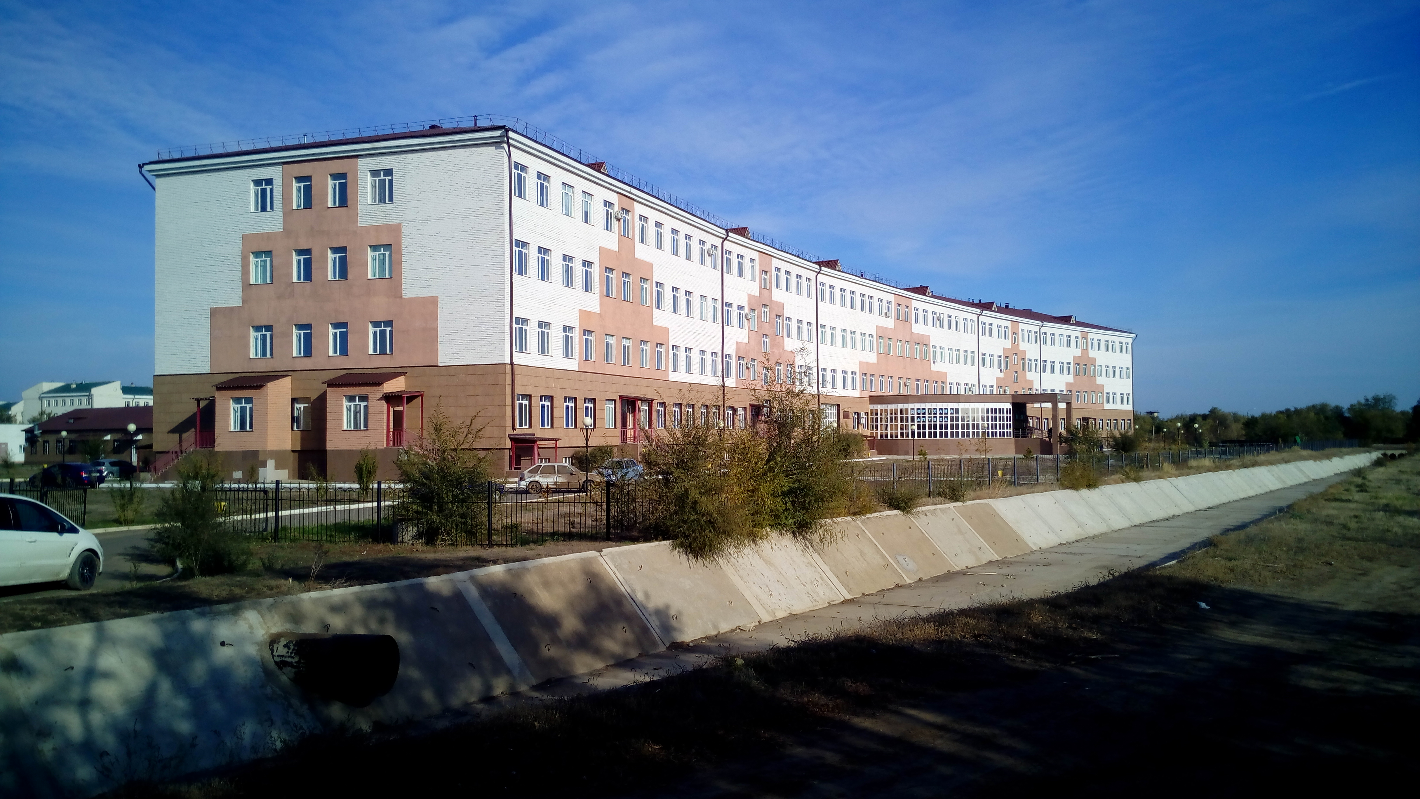 Детская больница